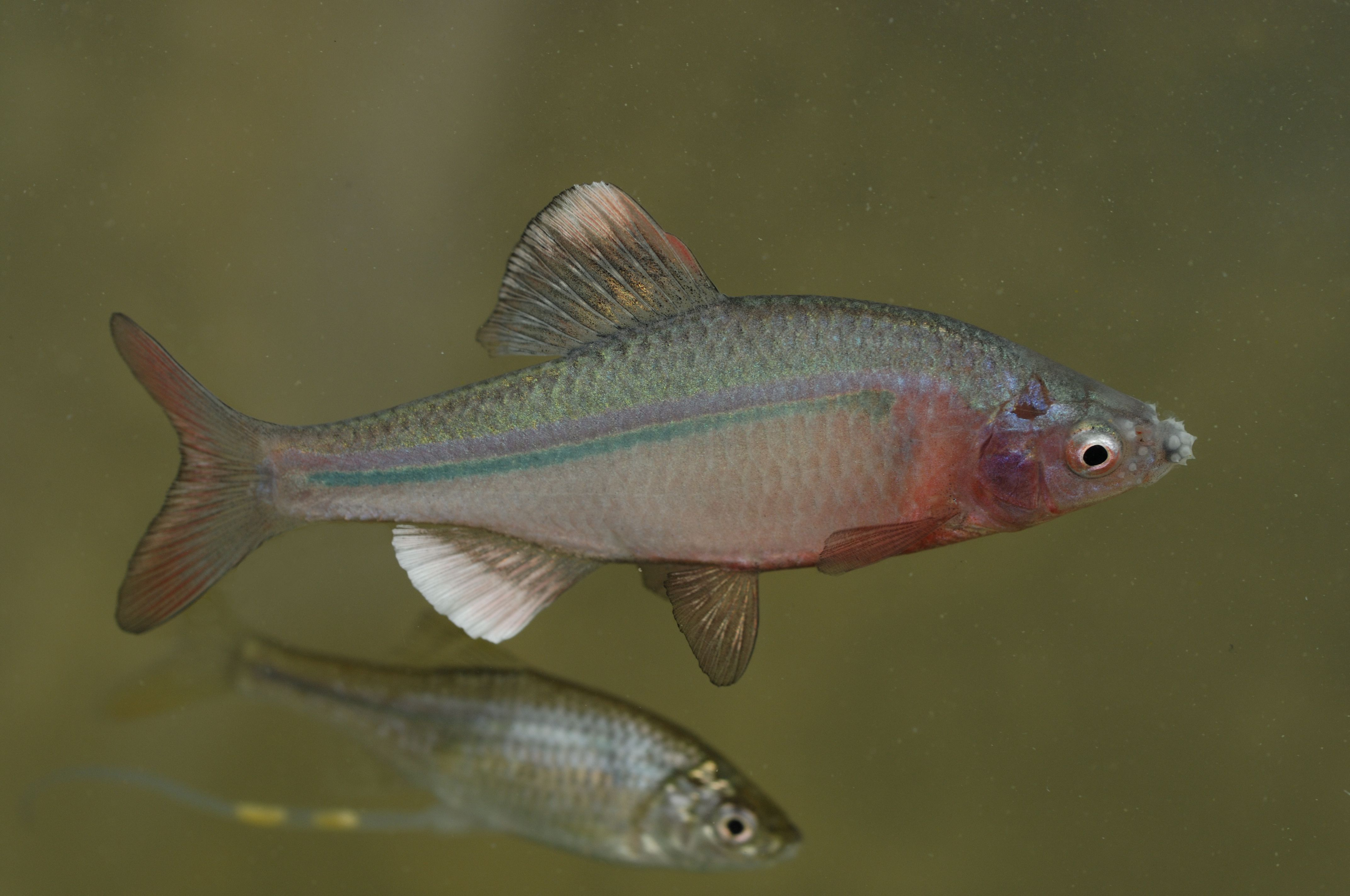 初夏、繁殖期のイチモンジタナゴの雌雄（三重県）。詳細